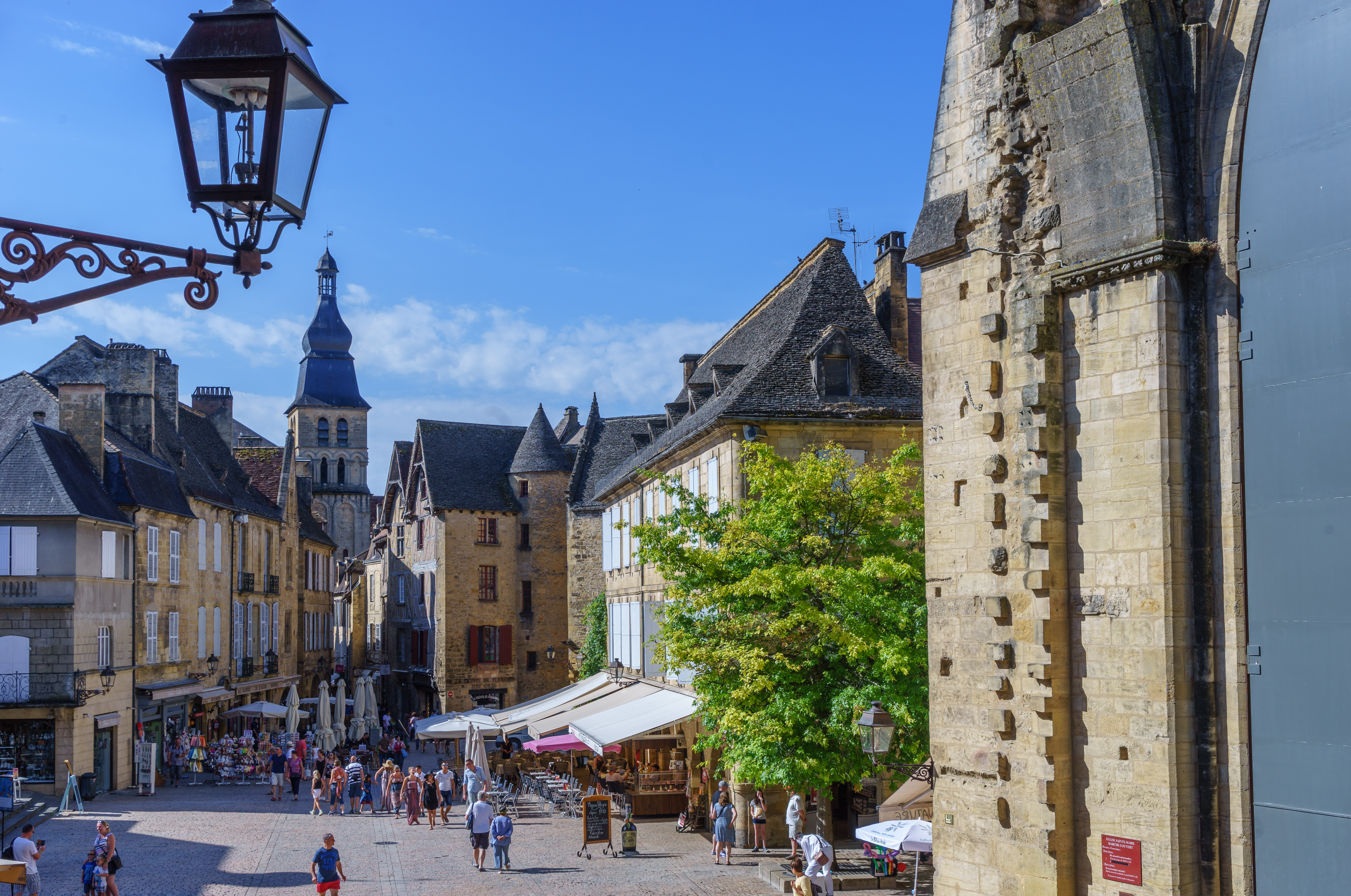 Sarlat - Place de la Liberté